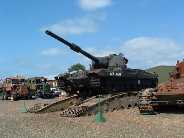 William